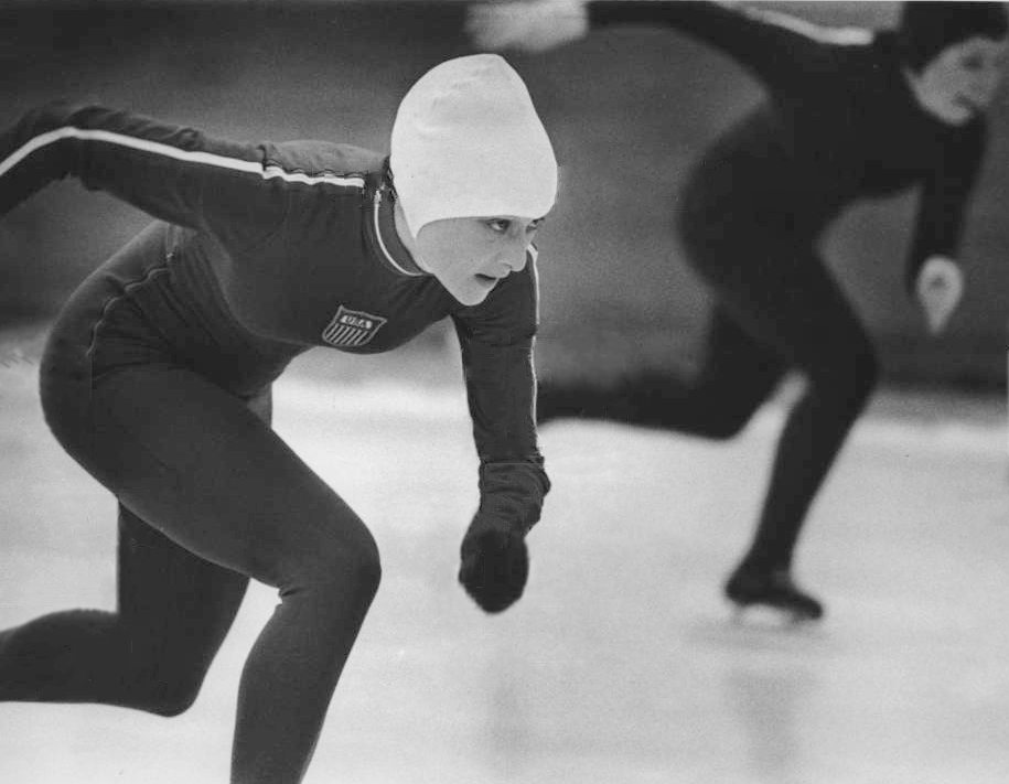 1975 PRESS PHOTO LEAH POULOS, START OF 500 METER AT OLYMPIC RINK